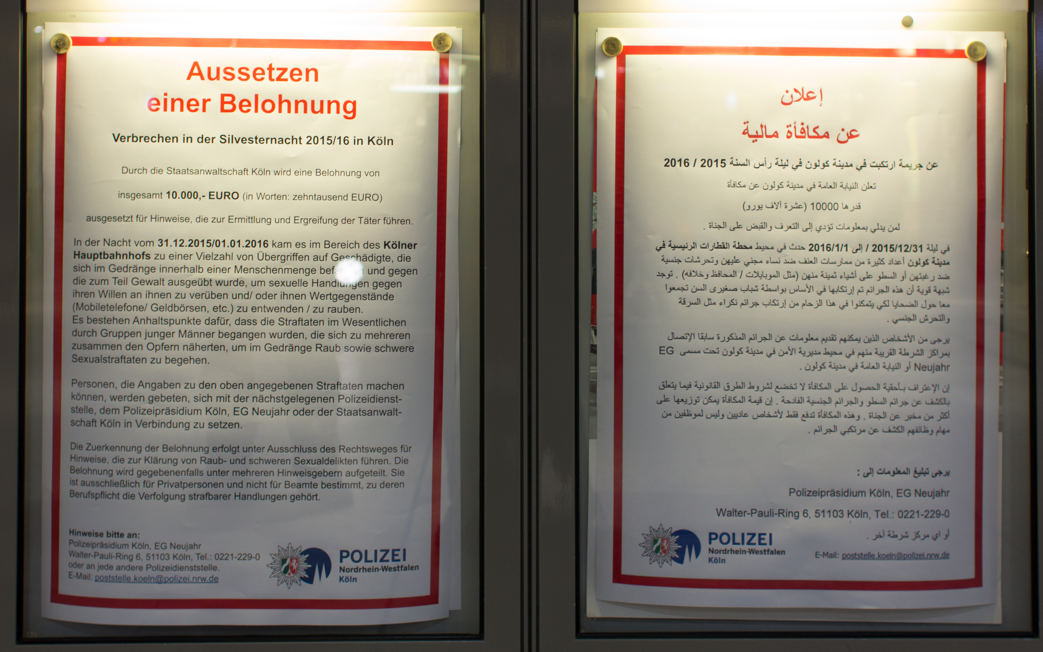 Aushang: Aussetzen einer Belohnung, Verbrechen in der Silvesternacht 2015/16 in Köln, Belohnung von 10.000 Euro für Hinweise, die zur Ermittlung und Ergreifung der Täter führen. Polizeipräsidium Köln, EG Neujahr. Deutsch/Arabisch